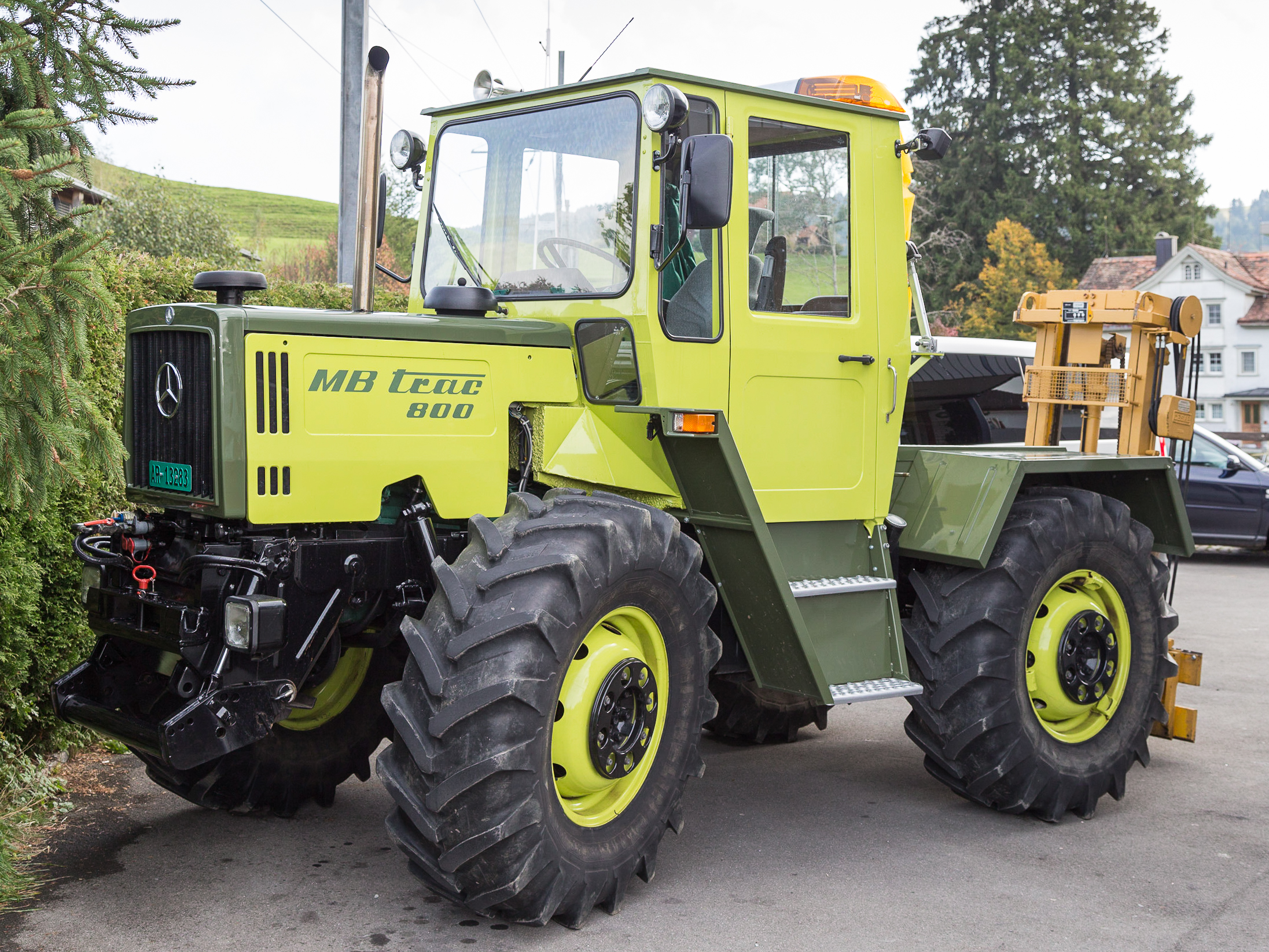 MB-Trac 800 in Gais AR, Schweiz